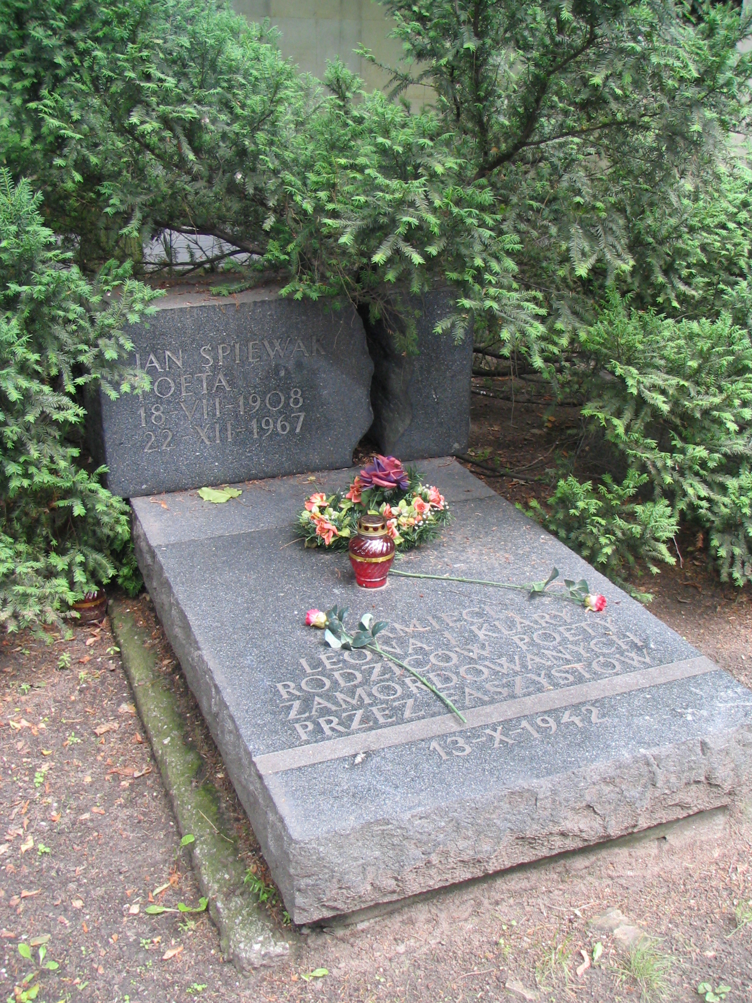 Grób Jana Śpiewaka